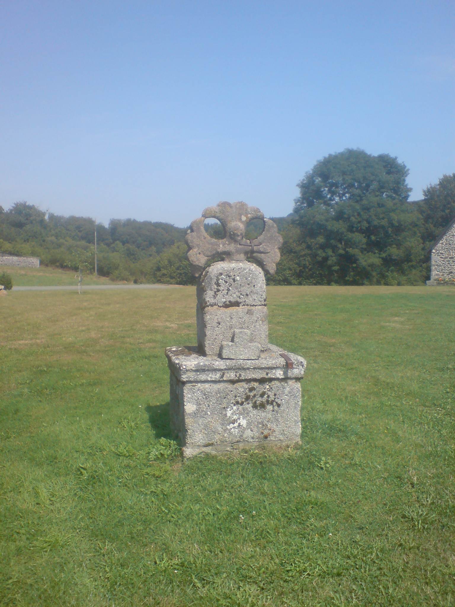 Croix monumentale de pierre, du XVIe siècle, à Courteix, France (devant l’église). Extrémités élargies (croix pattée ?). Monument historique classé.